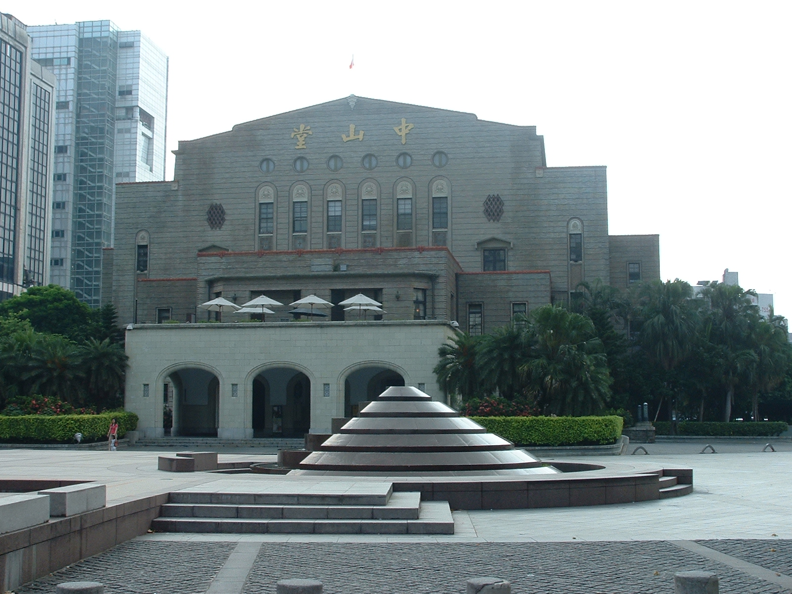 2006年7月23日的臺北公會堂。